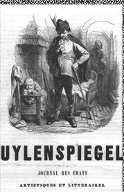 Title of the weekly 'Uylenspiegel, journal des ébats littéraires et artistiques': 1e année no. 2, 10 Février 1856